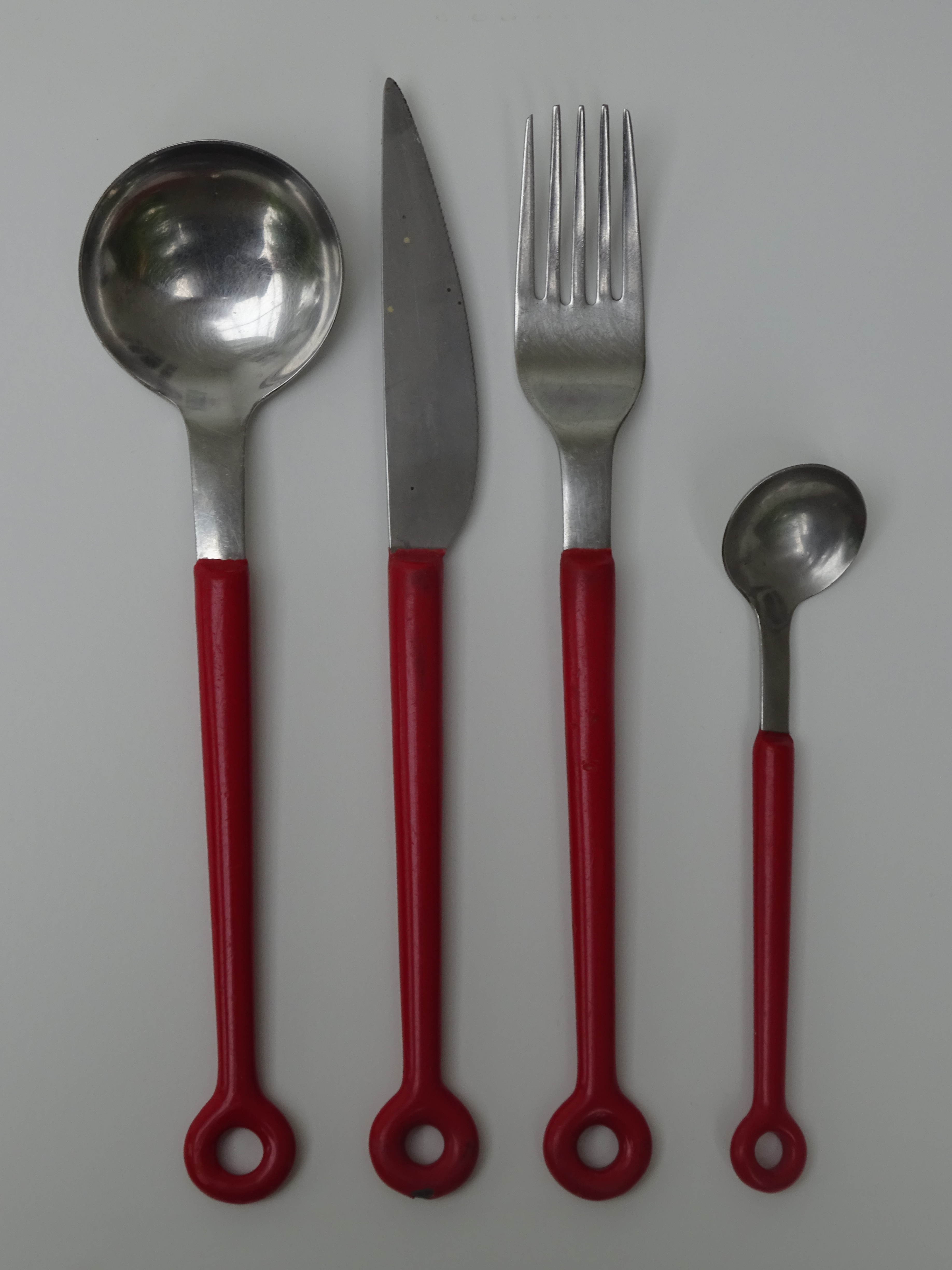 Esslöffel, Messer, Gabel, Teelöffel der Marke mono ring